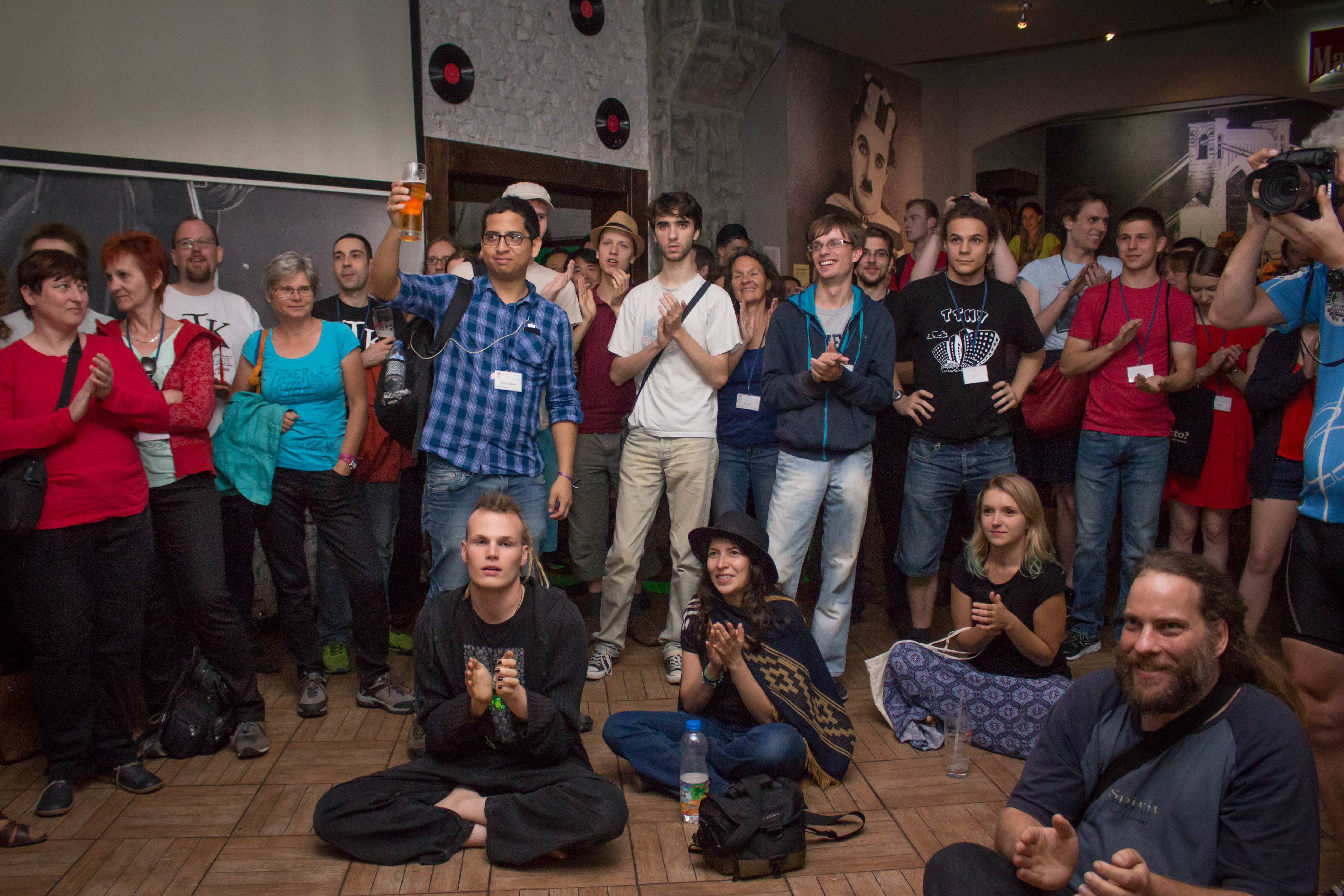 fot. Anna Maria Koniecpolska Uzante la fotojn bv. menci nomon de la aŭtoro (se indikita) kaj fonton: "Reta fotaro de Pola Esperanto-Junularo: ".